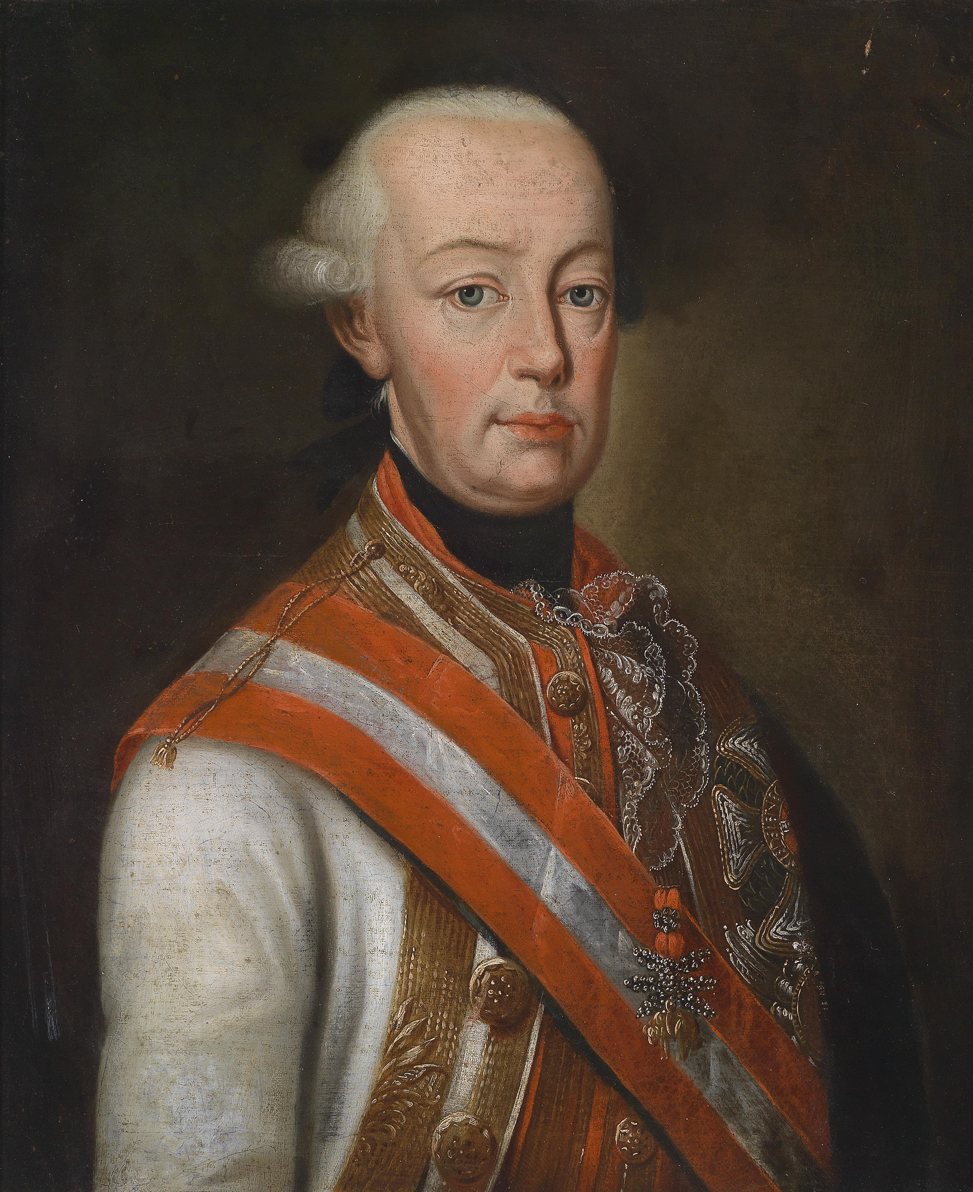 Leopold II. in Feldmarschallsuniform, dekoriert mit den österreichischen Hausorden